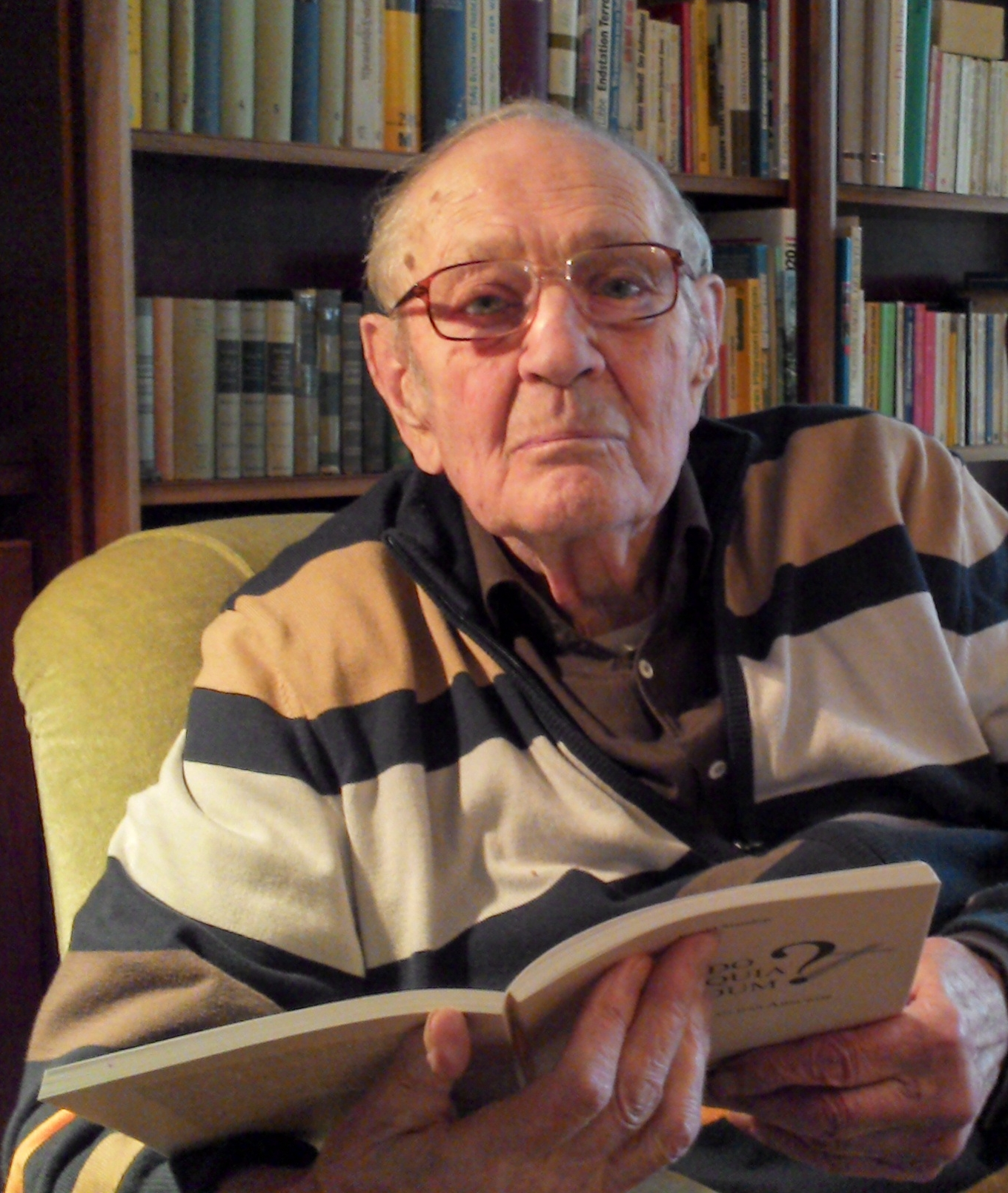 Prof. Dr. Ewald Standop, Würzburg, 2013Depicted person: Ewald Standop – German philologist and university teacher